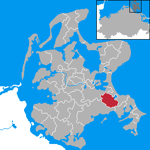 Zirkow, Landkreis Rügen, Mecklenburg-Vorpommern